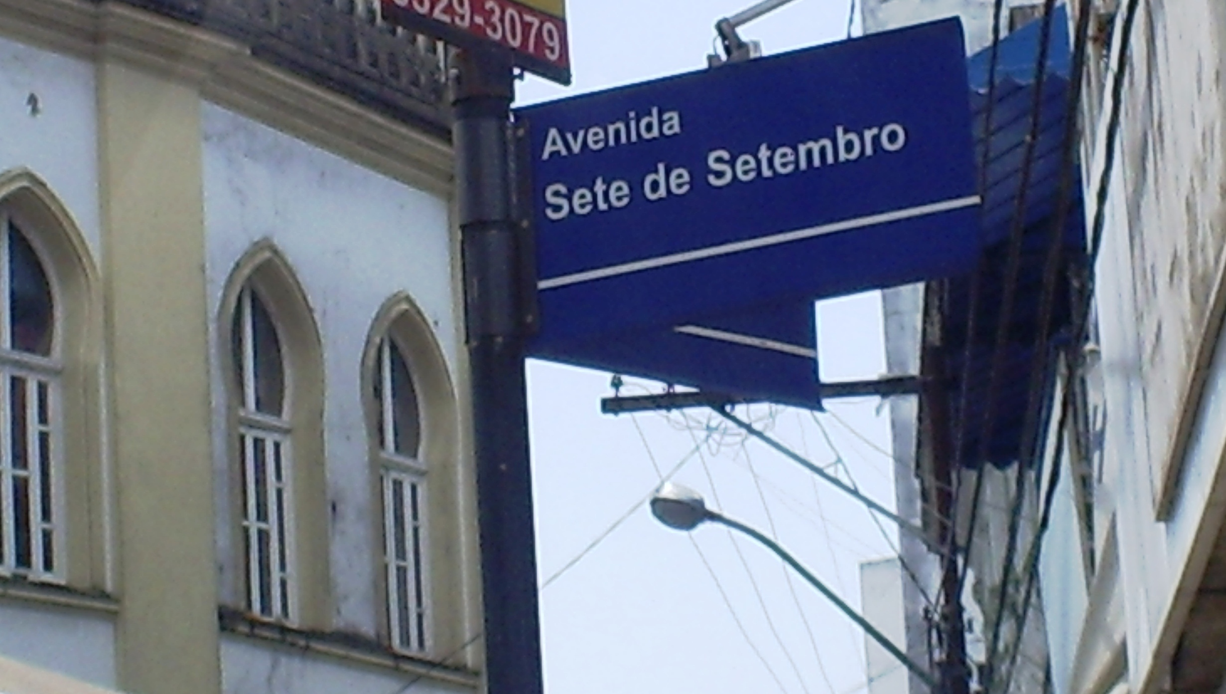 Placa indicando a Avenida Sete de Setembro, Salvador, Bahia, Brasil.